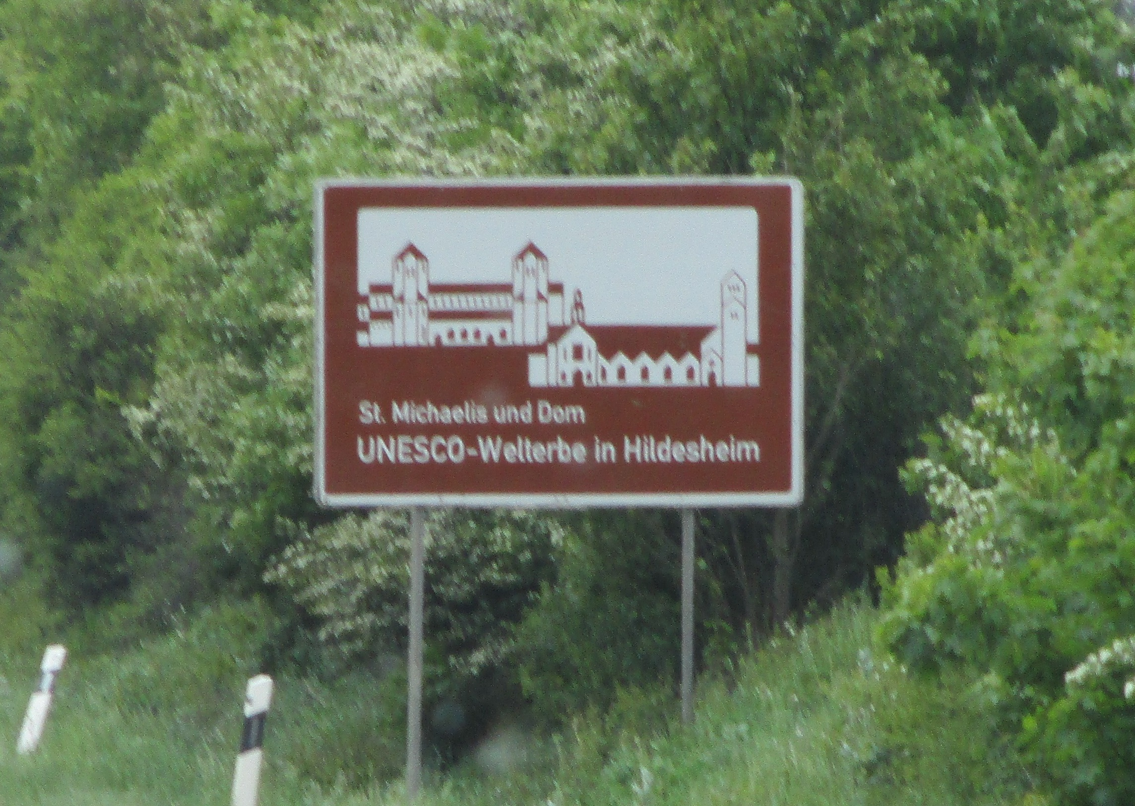 Unterrichtungstafel an der A 7, Hinweis auf das UNESCO-Welterbe Dom und St. Michaelis in Hildesheim